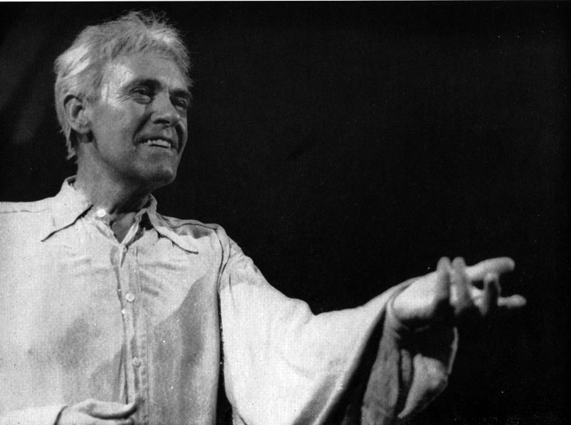 Kolbjörn Knudsen spelar "Ur Peer Gynt". TV-teater 1961